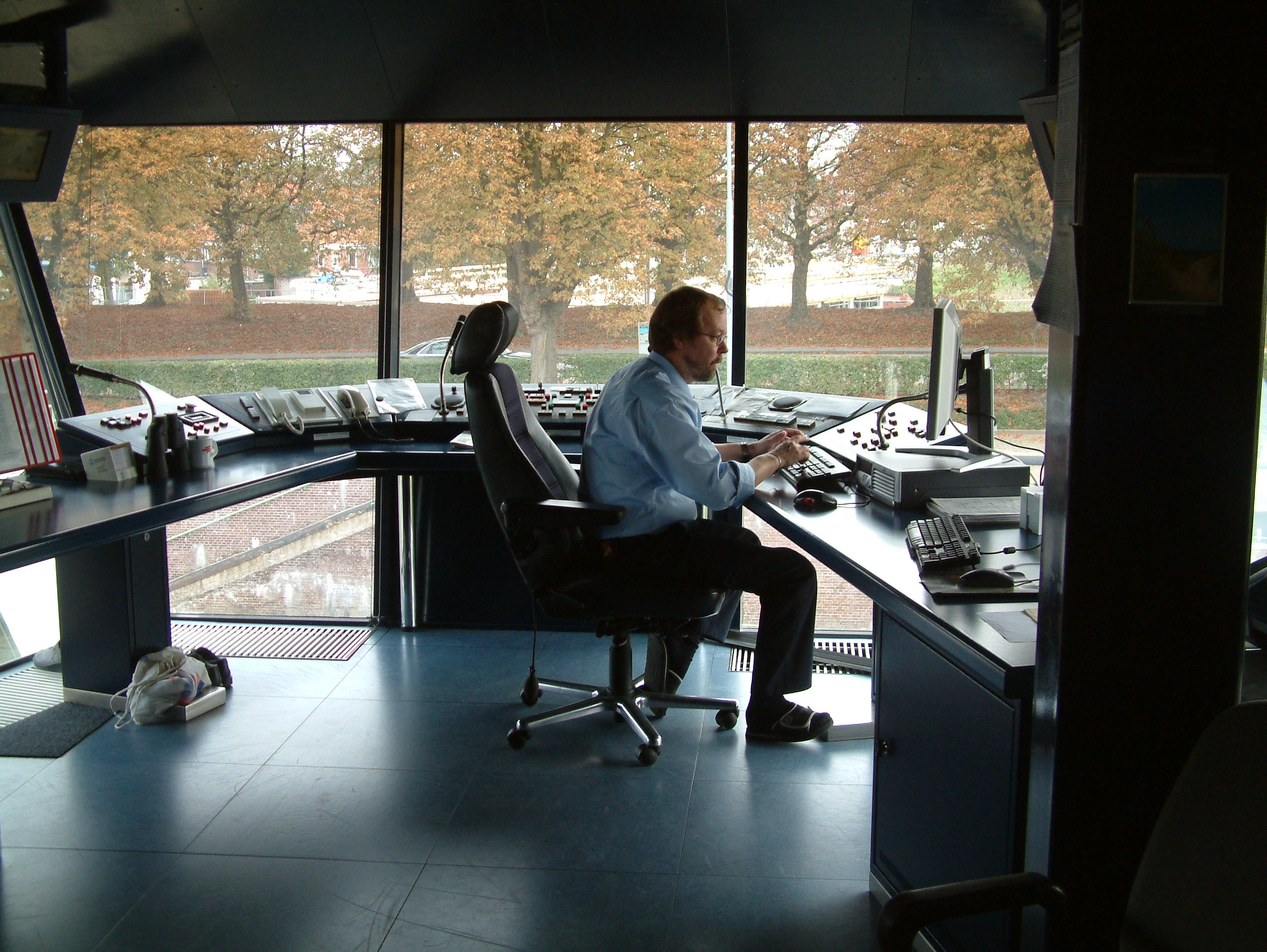 De Grote Merwedesluis te Gorinchem